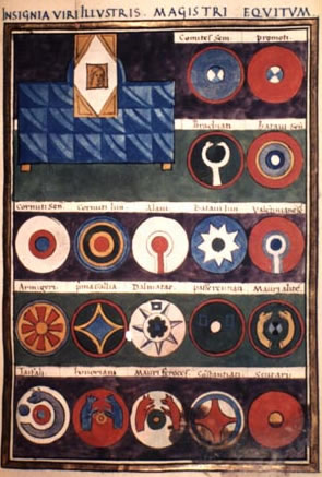 Seite aus der notitia dignitatum